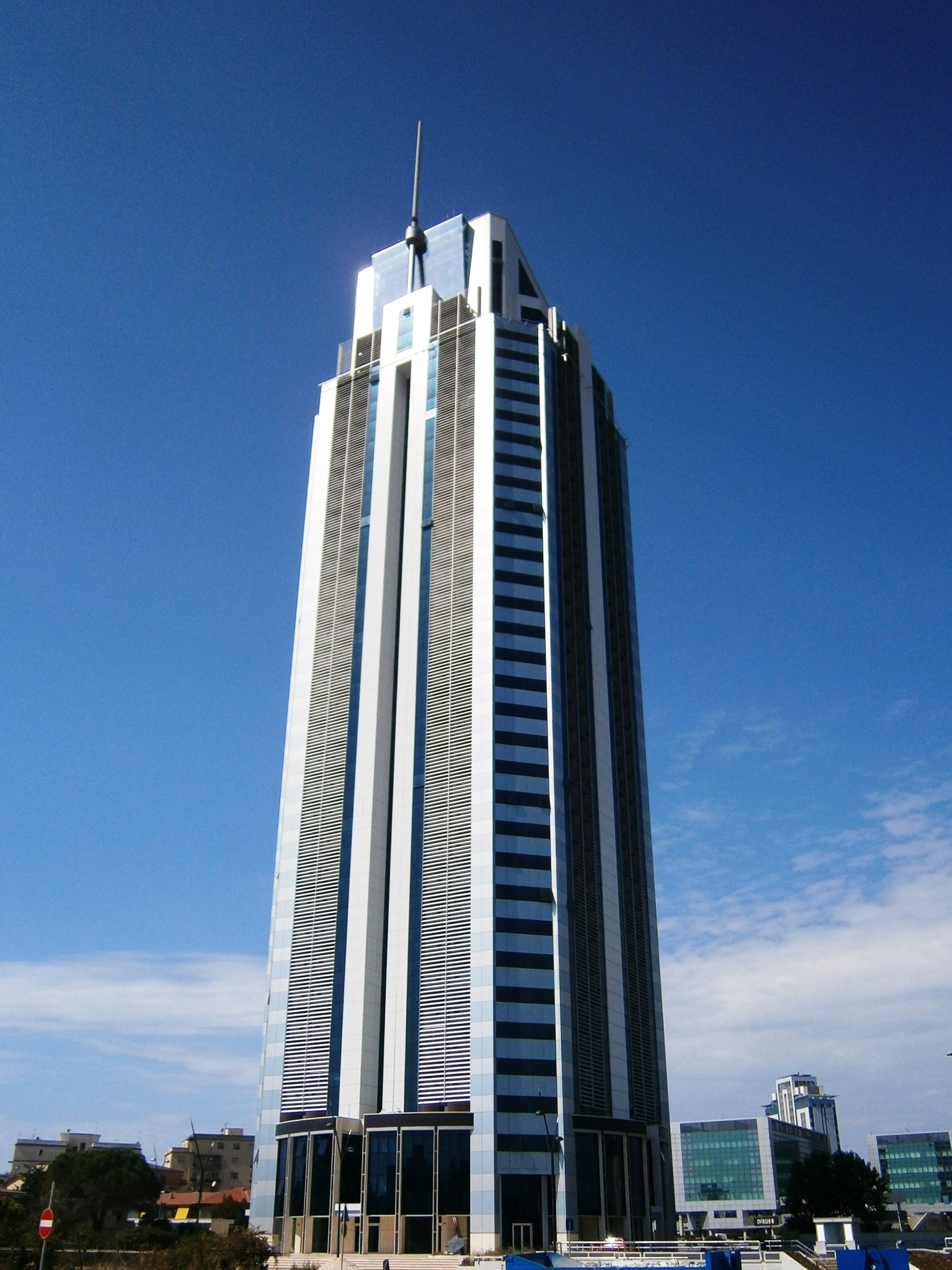 Grattacielo "Torre Pontina" (Latina)